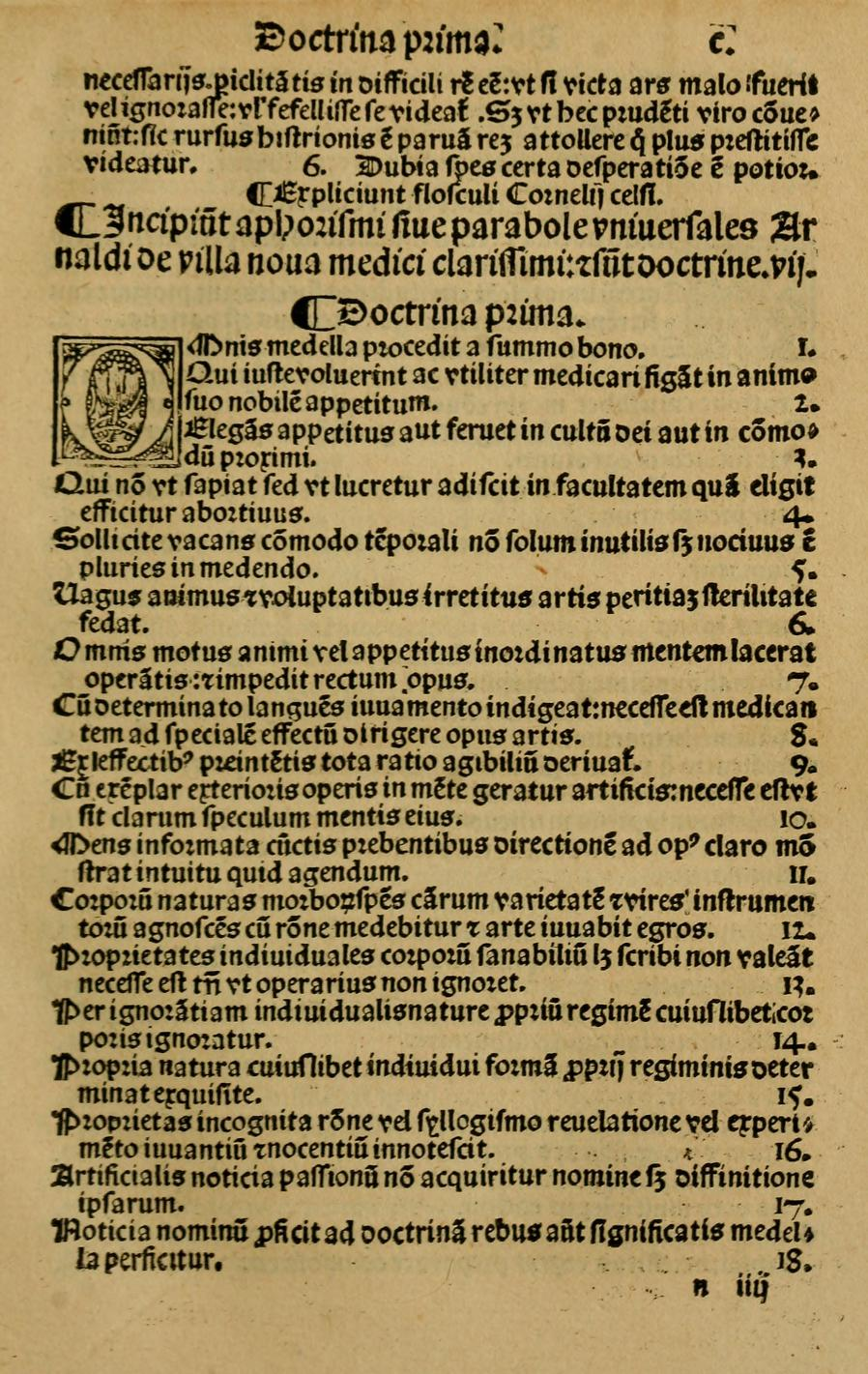 Arnaldus de Villa Nova, "Aphorismi seu Parabolae" in Articella nuperrime impressa (Lyon, 1519) first page of text